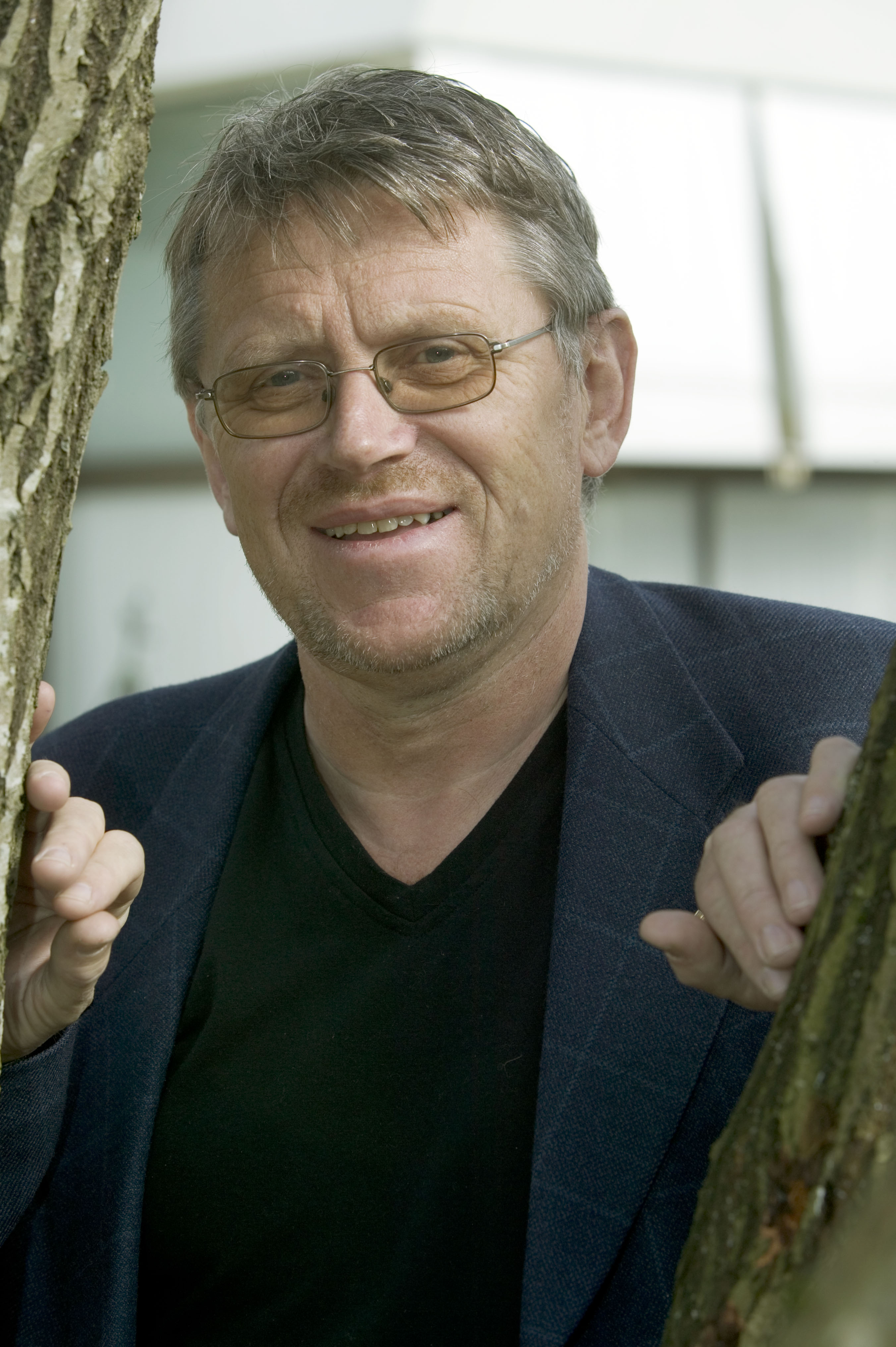 Henning Skumsvoll, FrP-politiker